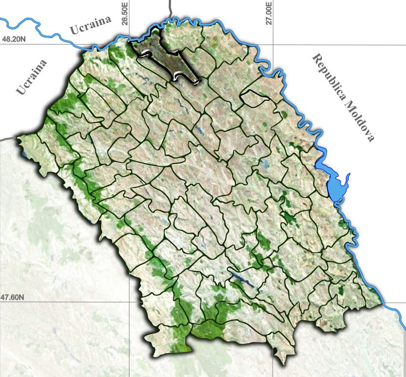 Darabani jud Botosani.